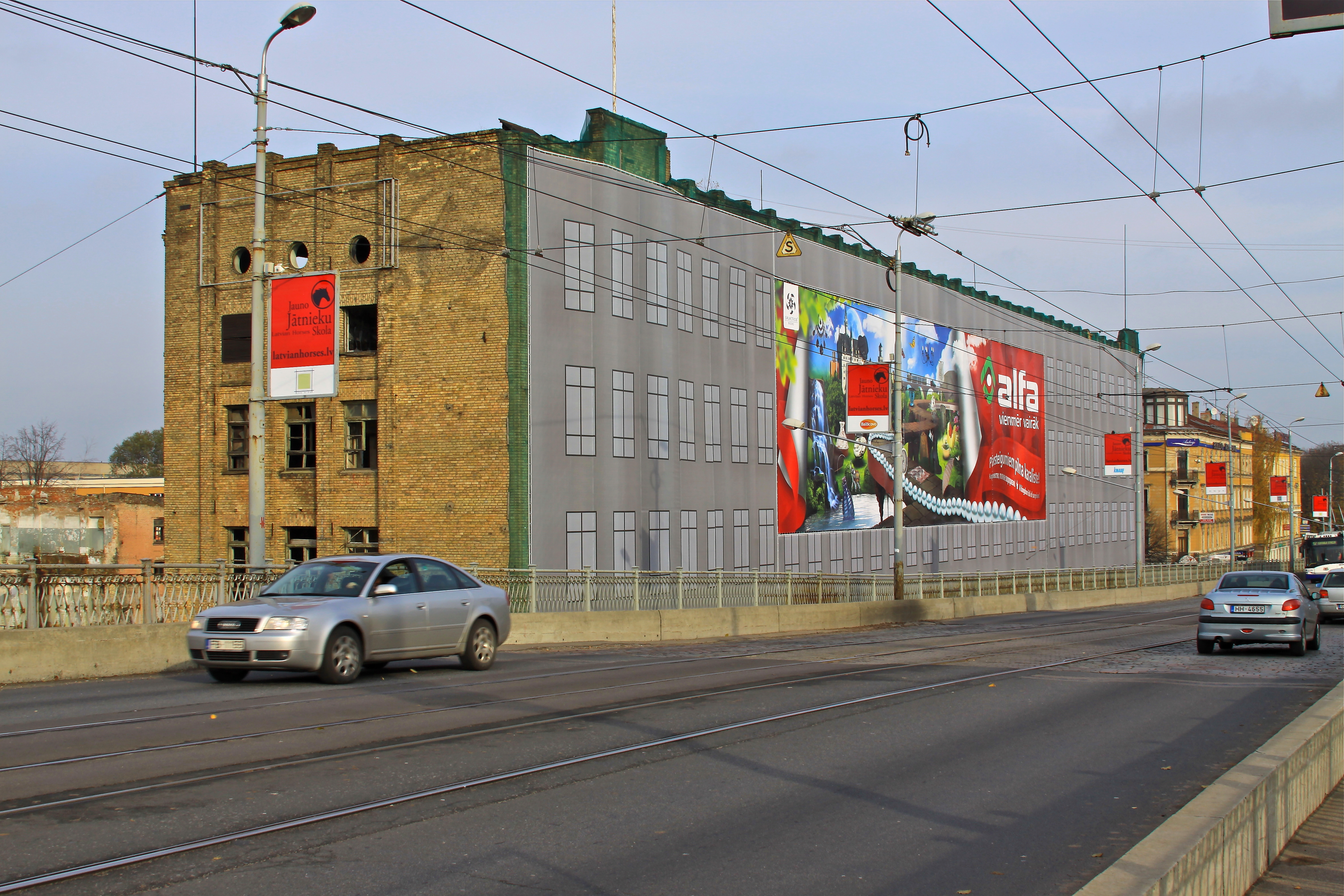 Фото главного корпуса завода Саркана Звайгзне в Риге